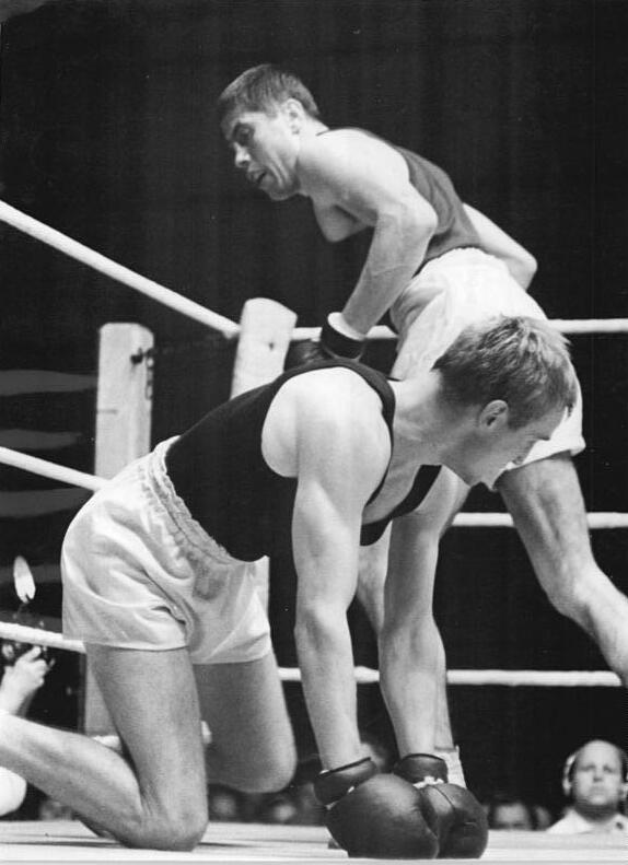 Dieter Kottysch, Bruno Guse Zentralbild Studré tre.30.5.1964 Schwerin: Olympia-Ausscheidungskämpfe im Boxen In der Schweriner Sport- und Kongreßalle wurden am 29.5.1964 die Olympia-Ausscheidungskämpfe im Boxen mit den Begegnungen zwischen der A-Staffel der DDR und westdeutschen B-Mannschaft fortgesetzt. UBz: Von den einheimischen Zuschauern begeisteert gefeiert erreichte Bruno Guse (DDR, 24) im Weltergewicht gegen Rechtsausleger Dieter Kottysch (DABV - am Boden - 20) einer eindeutigen Punktsieg. Guss erzielte in der 2. Runde einen Niederschlag.